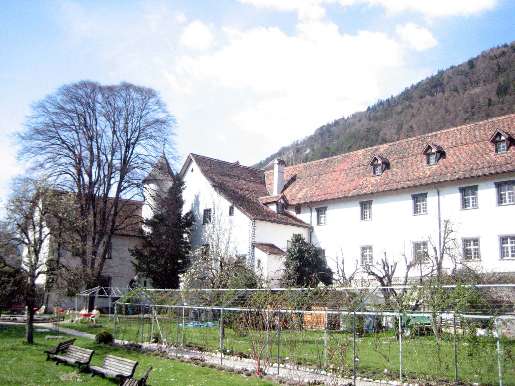 Im Schlossgarten